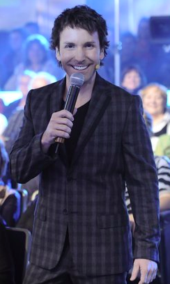 Anime l'émission Fidèle Au Poste